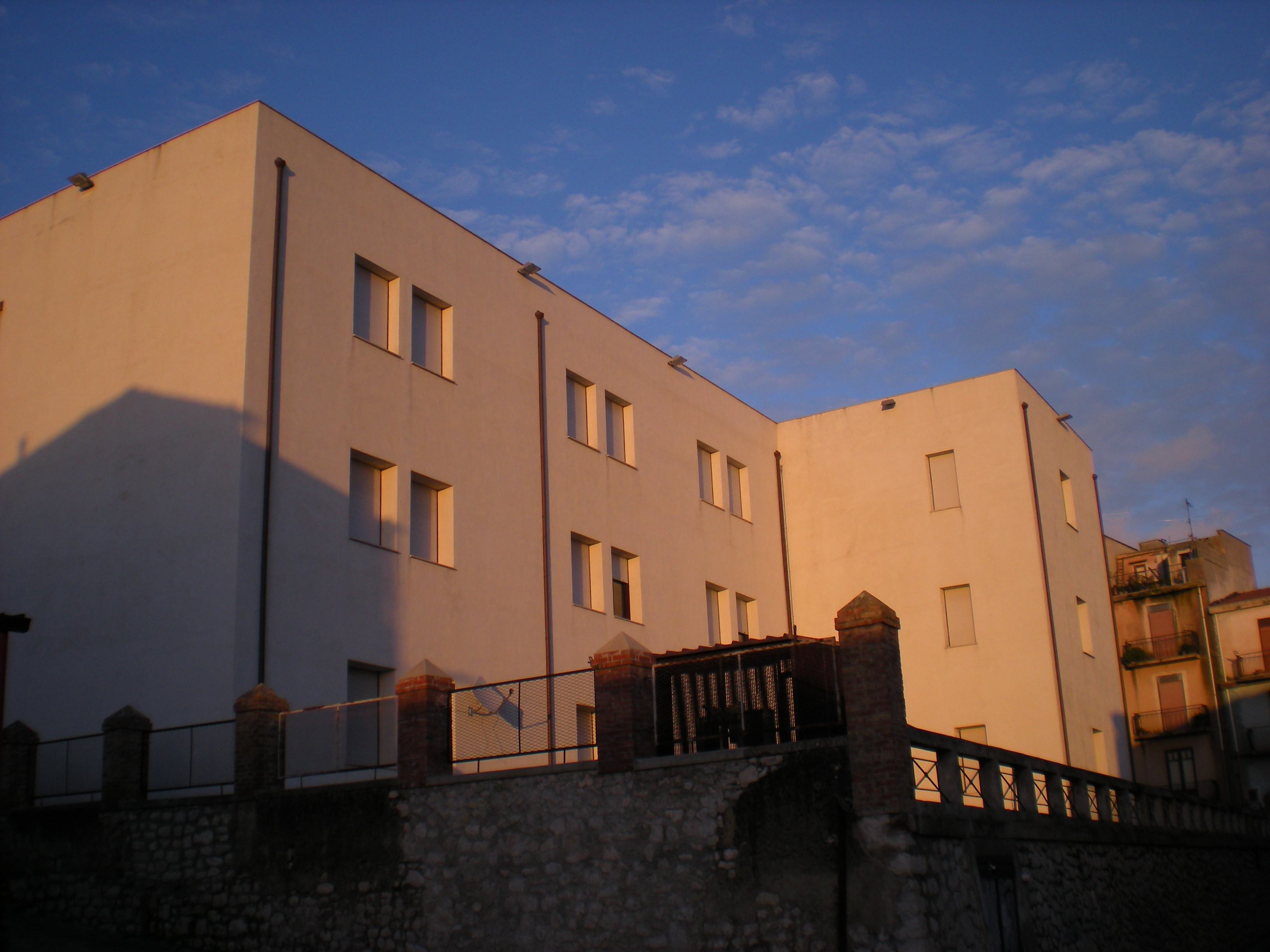 ITCG di Bivona